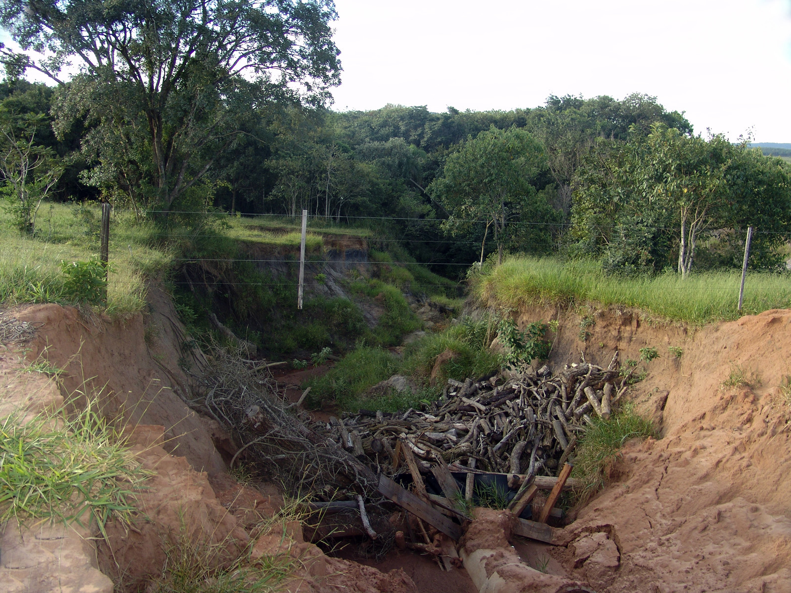 Voçoroca ou Boçoroca (iby=terra e soroc=fenda) em Avaré, Brasil. Localização geográfica: Lat. 23º12'24" sul e Long. 48º47'59" oeste